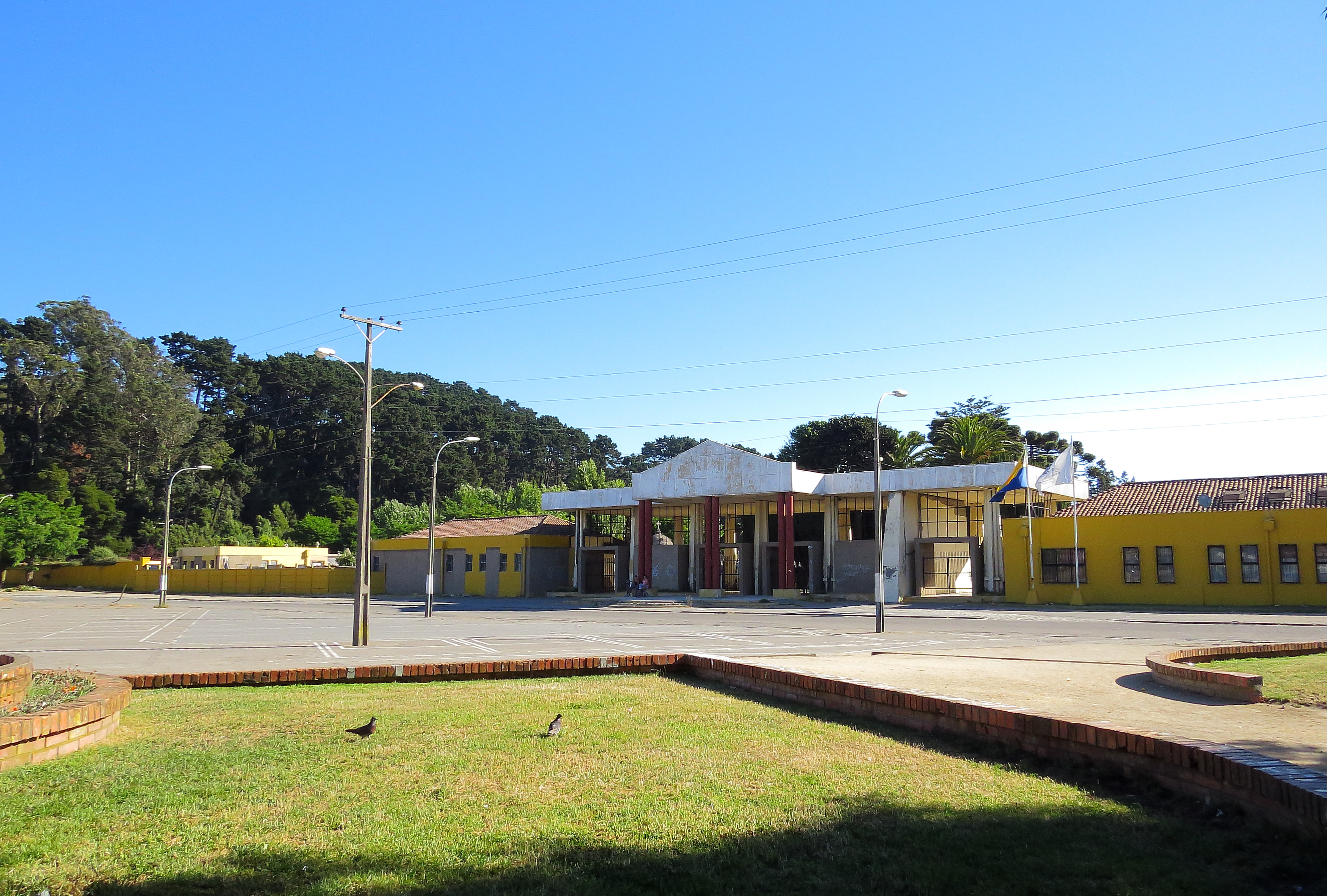 Entrada al Cementerio General de Concepción Chile